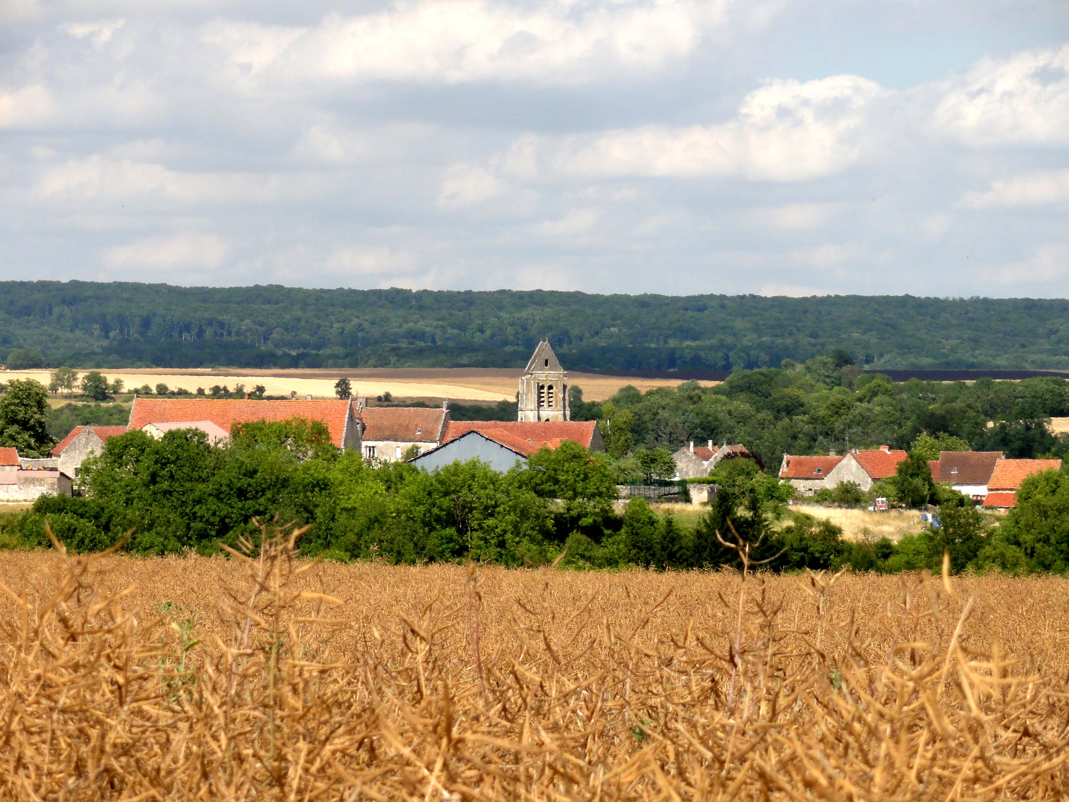 Église Saint-Laurent de Russy-Bémont (voir titre).